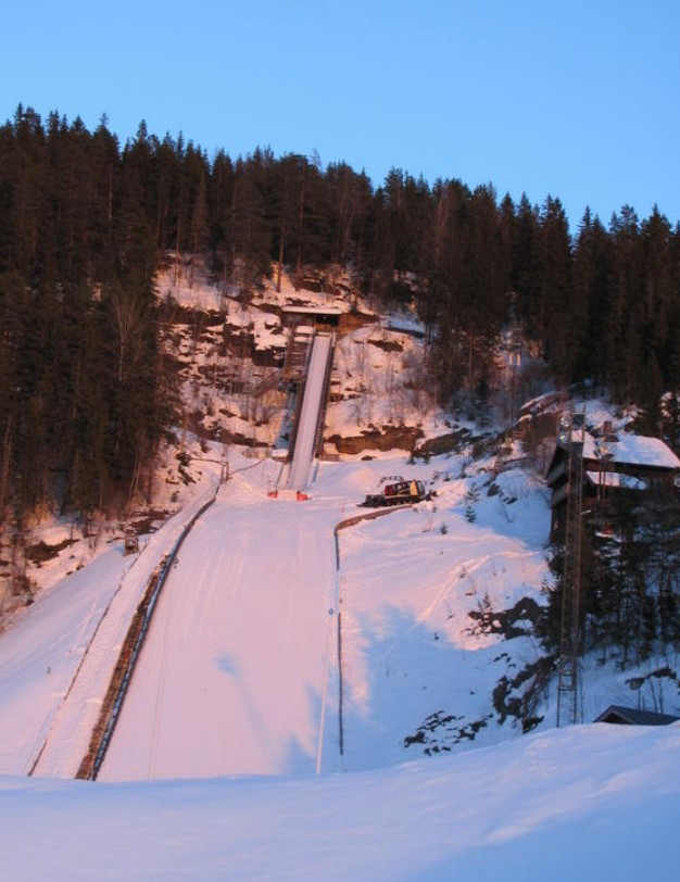 K105 i Vikersund Hoppsenter. Vikersund befinder sig i Modum kommune, Buskerud fylke, Norge